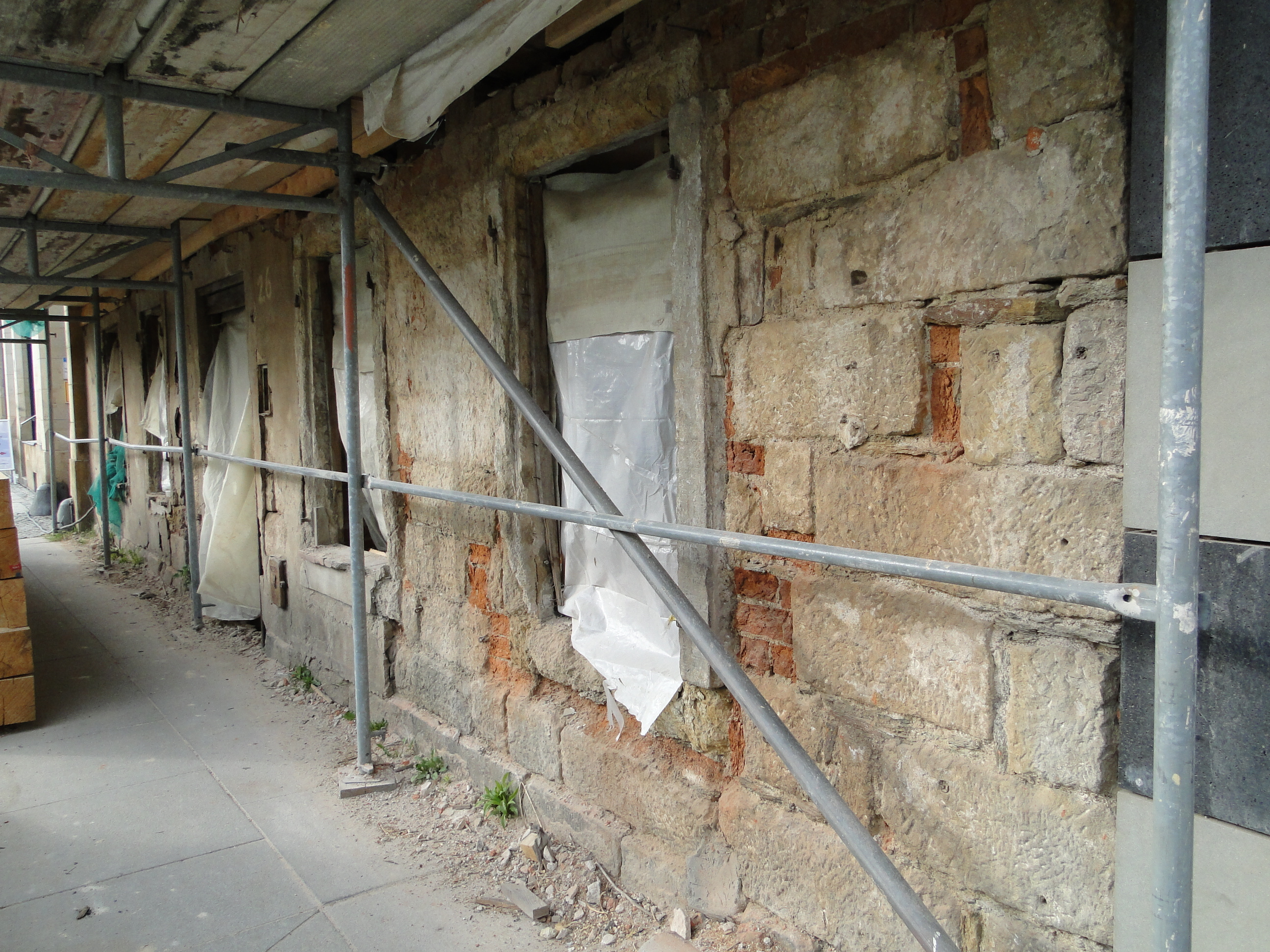 gemauerter Sockel des Manufakturhauses Friedrichstraße 26 während der Rekonstruktion 2011